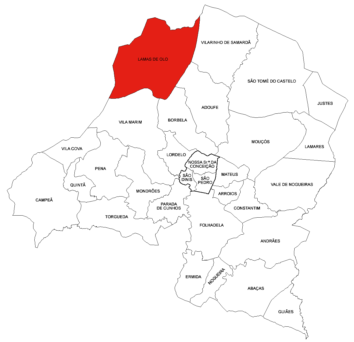 Freguesia de Lamas de Olo (concelho de Vila Real)